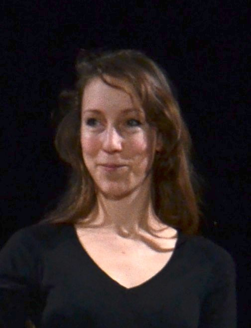 Iris Van Herpen Haute Couture SS2012 Iris van Herpen - Haute Couture Spring/Summer 2012.